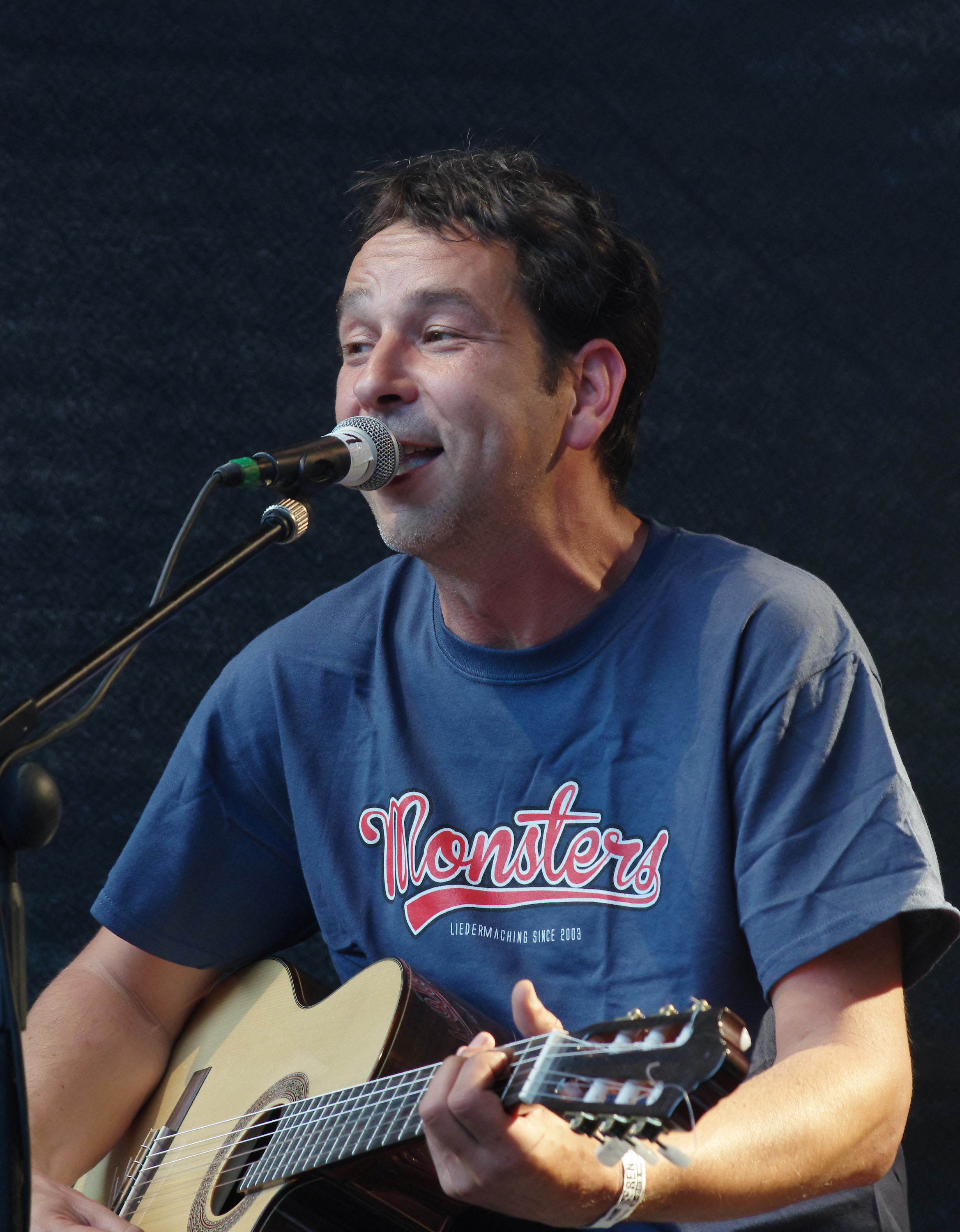 Monsters of Liedermaching beim 2. Rio-Reiser-Fest 2013 in Unna. Rüdiger Bierhorst, Jens Burger alias Burger (deutsch ausgesprochen), Peer Jensen alias Pensen Paletti, Jan Labinski alias Labörnski oder Lambada, Frederik Timm alias Fred Timm, Torsten Kühn alias Der flotte Totte oder Tottovic Kalkül.